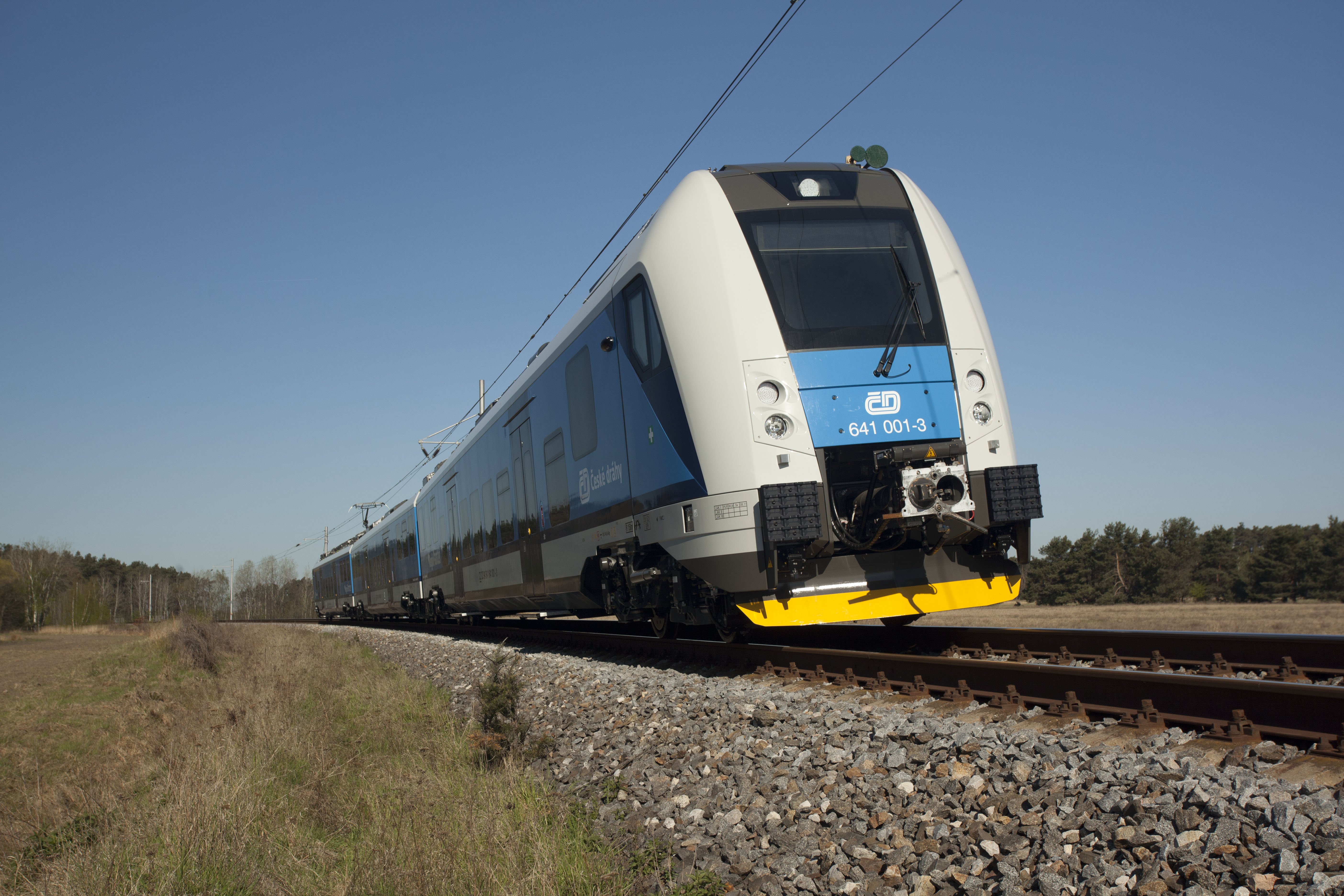 Moderní jednopodlažní elektrická jednotka